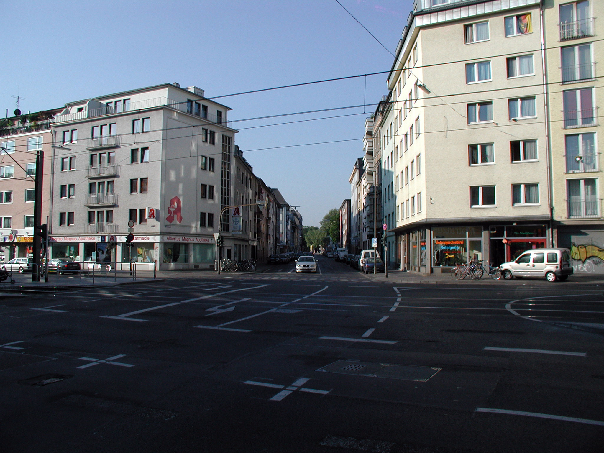 Kölner Bäche